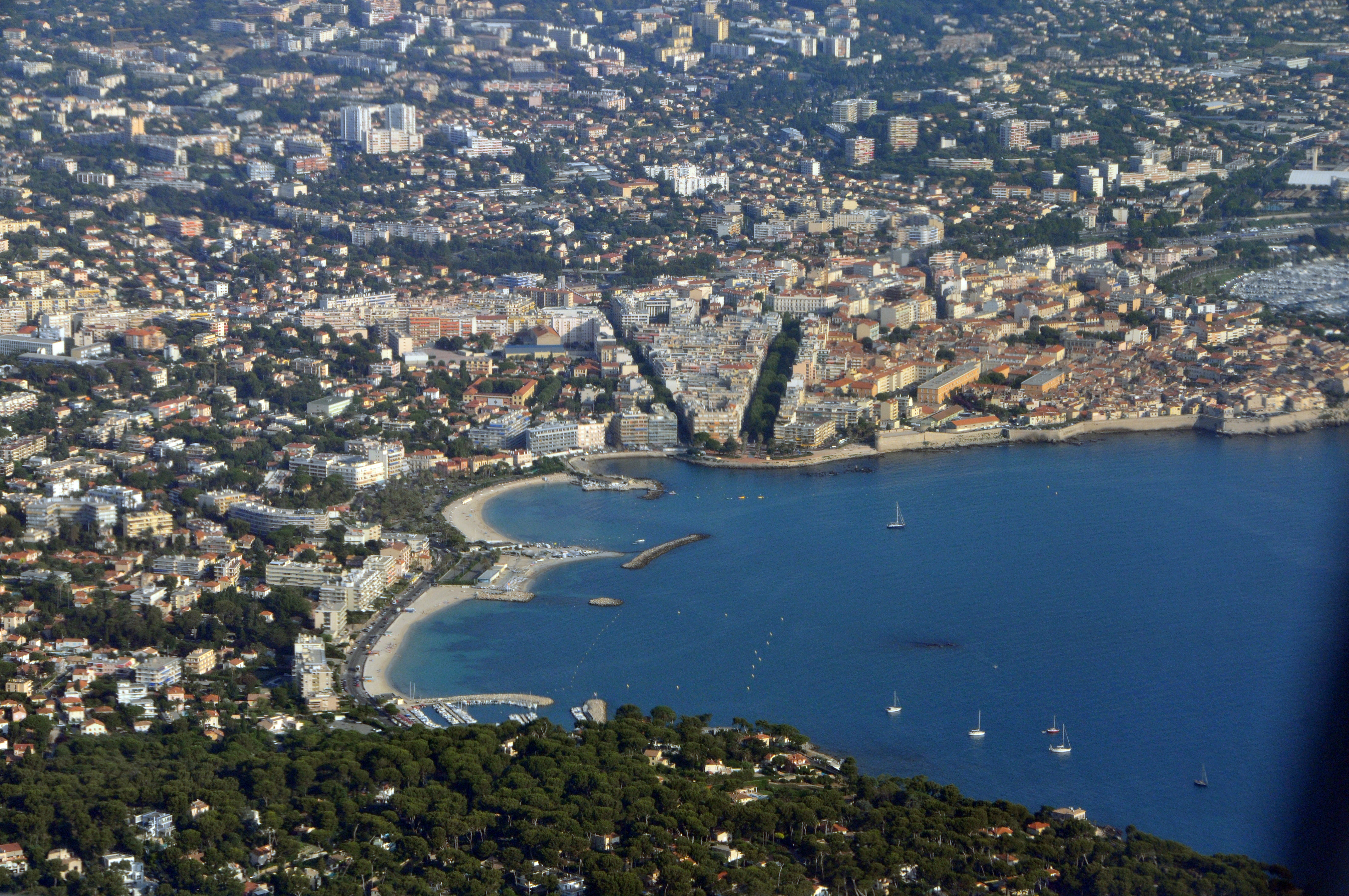 Antibes